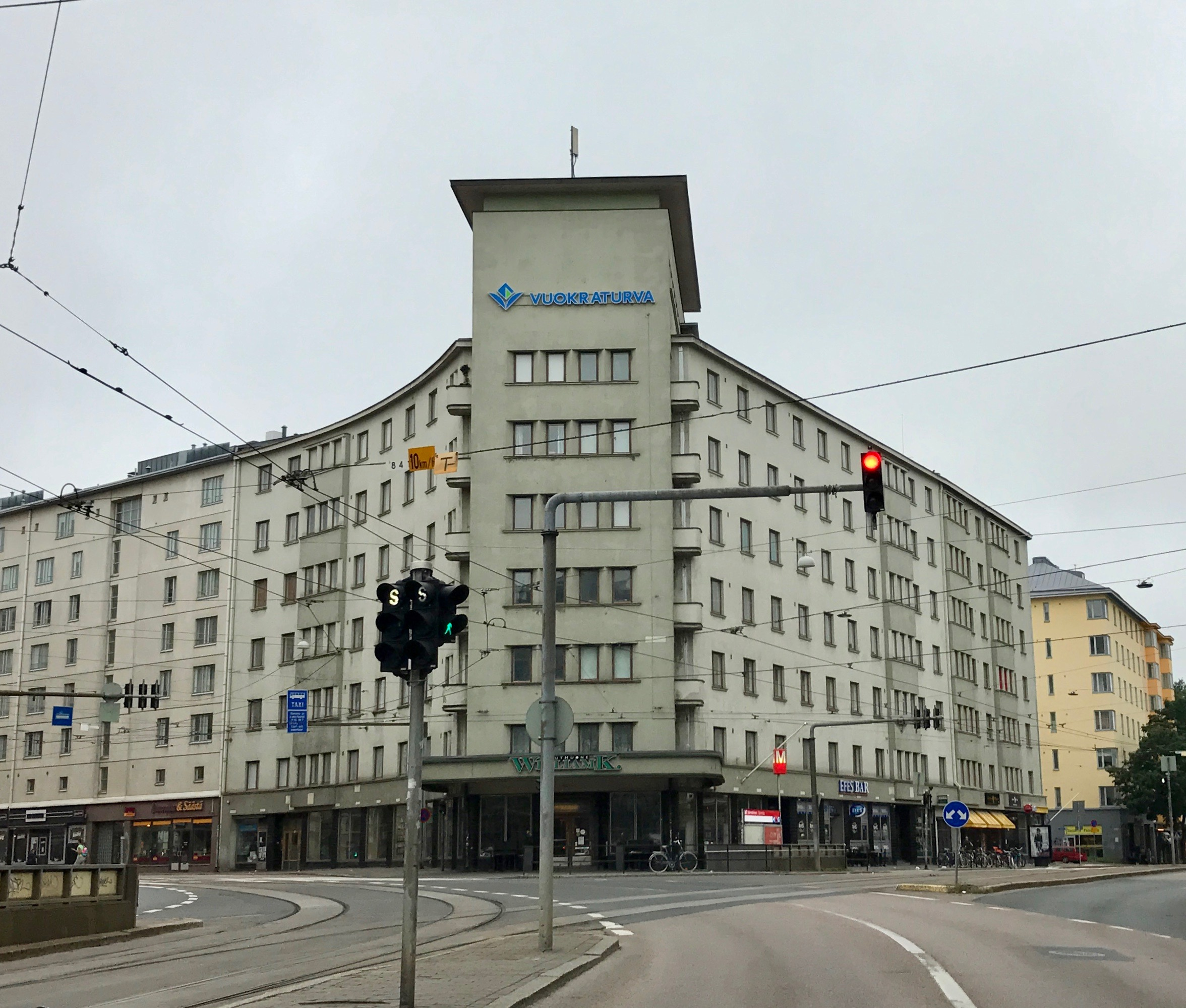 Vuokraturvan mainos rakennuksen seinässä Helsingin Hämeentiellä.